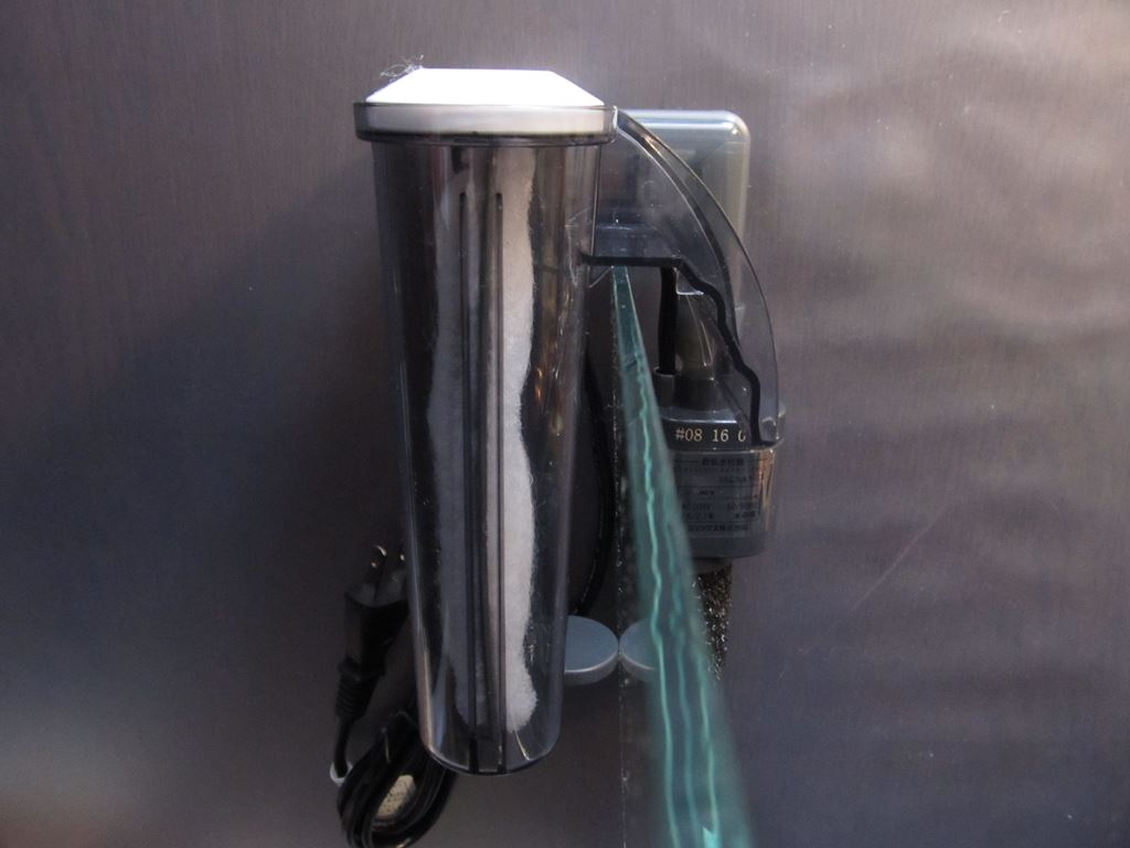 ジェックス・外掛け式スリムフィルター「スリムフィルターＳＳ」